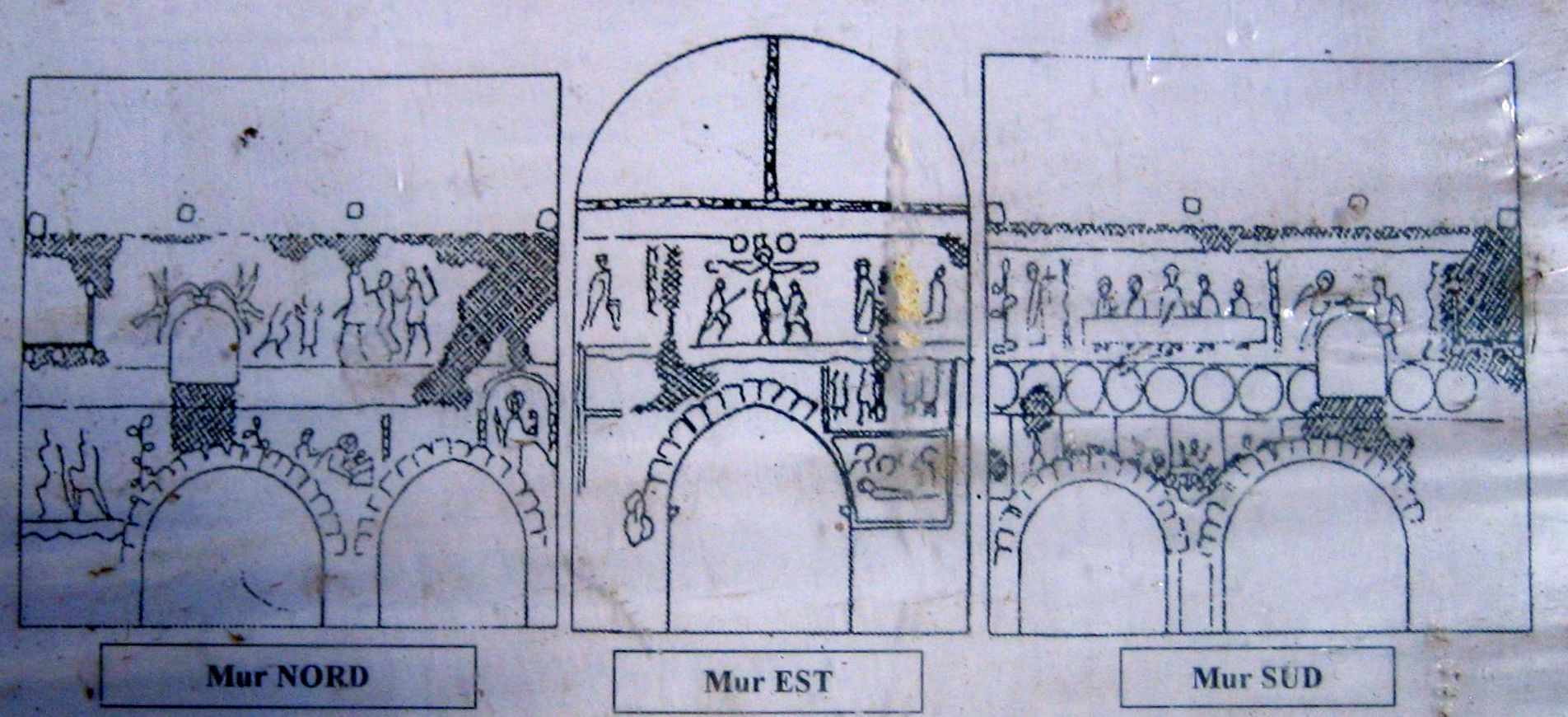 Église Saint-Laurent de Lourouer Saint-Laurent: disposition des fresques